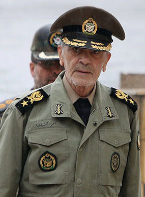 سرتیپ ناصر محمدی‌فر در مراسم تشییع پیکر سرتیپ سیروس لطفی، آبان ۱۳۹۷